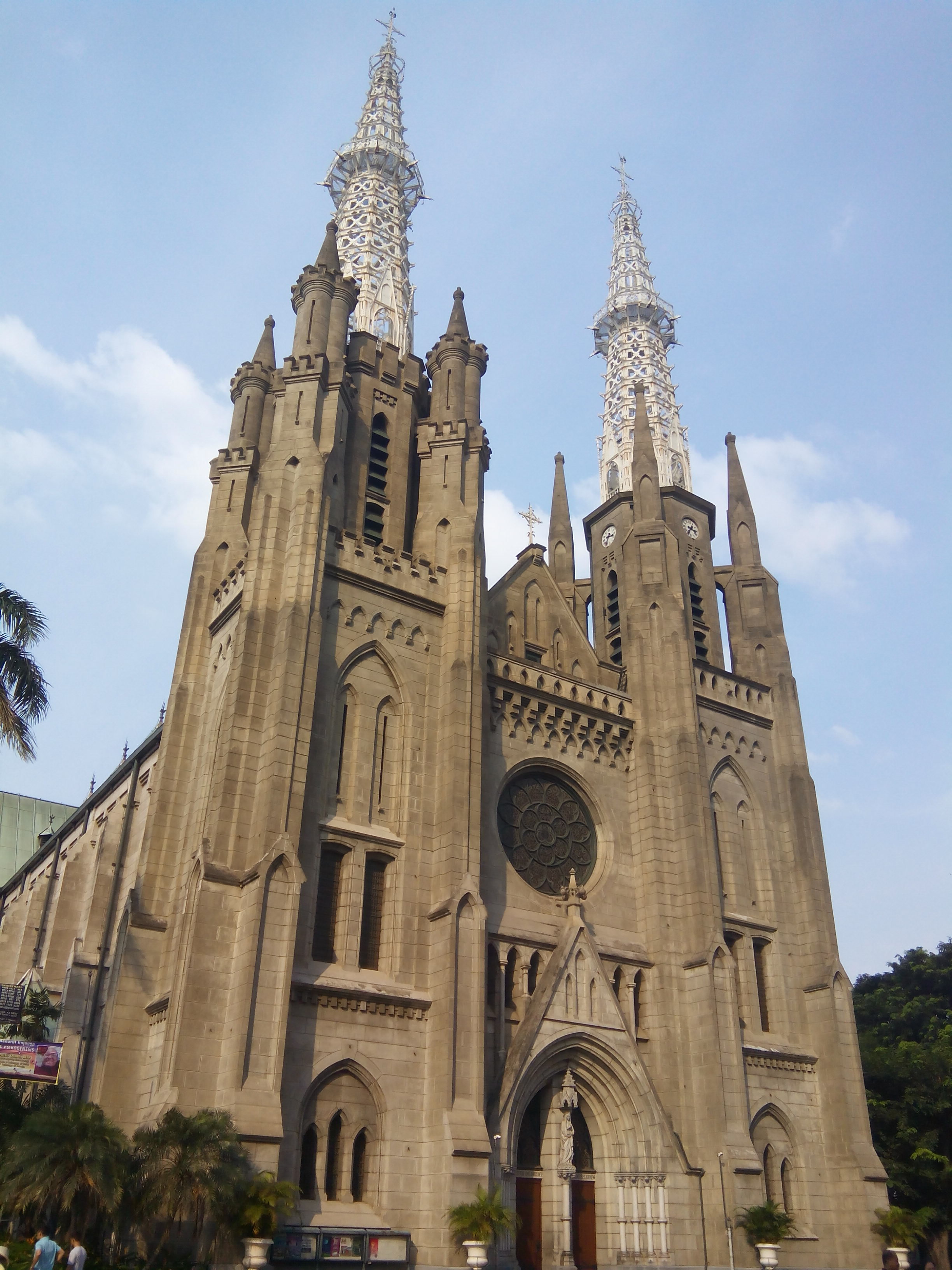 Gereja Katedral Jakarta